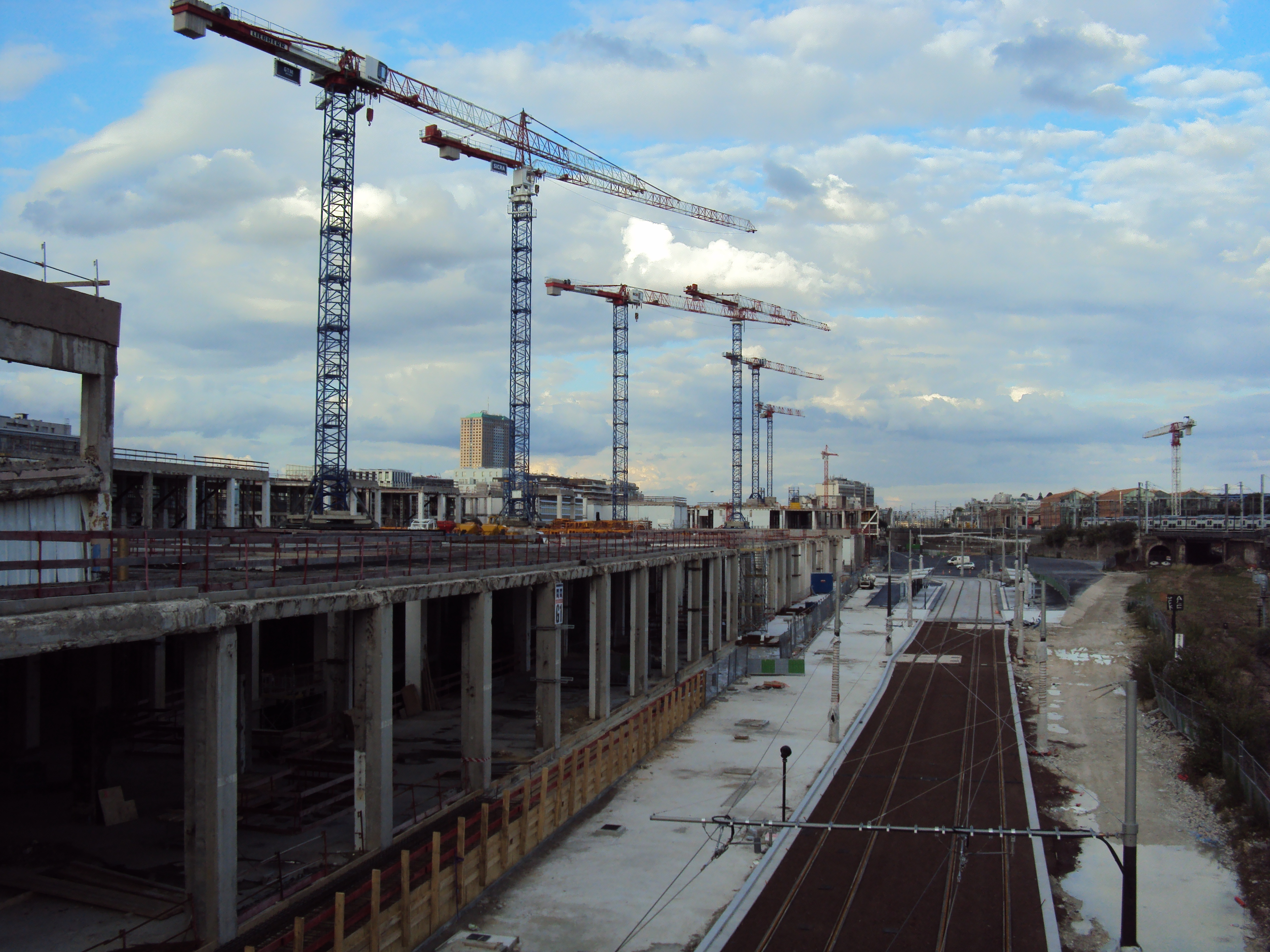 Travaux T3b - station Rosa Parks et petite ceinture vues depuis le pont de la rue d'Aubervilliers